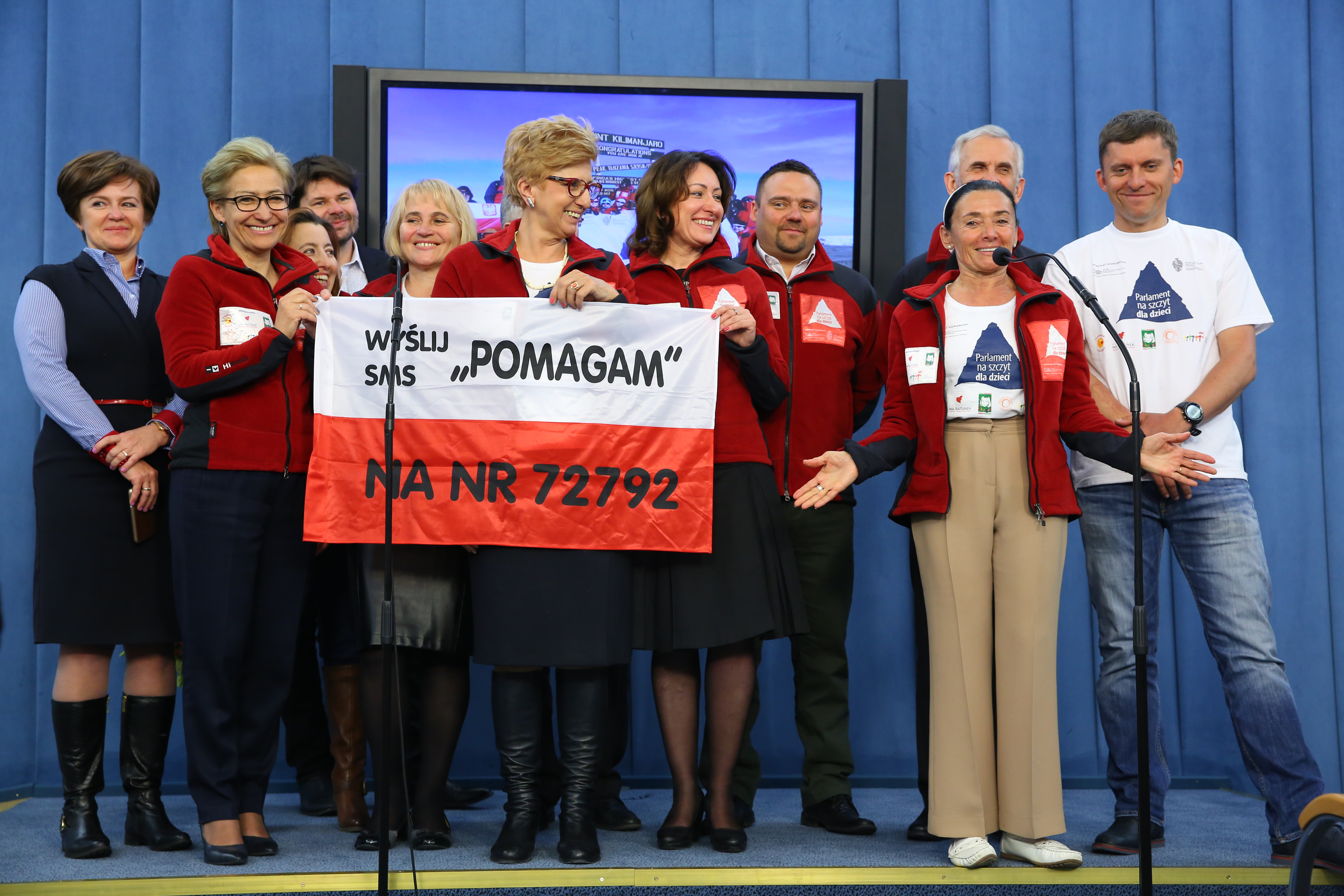 Konferencja prasowa poświęcona projektowi "Wyprawa na szczyt dla dzieci" w Sejmie